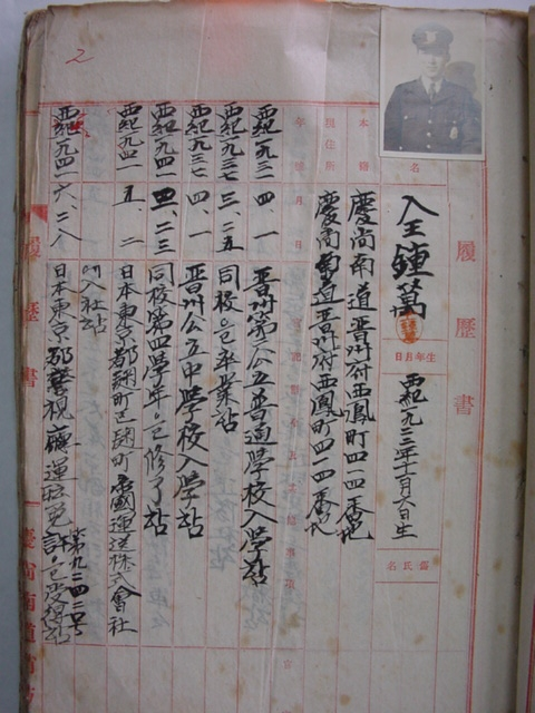 경상남도 소방 역사사진